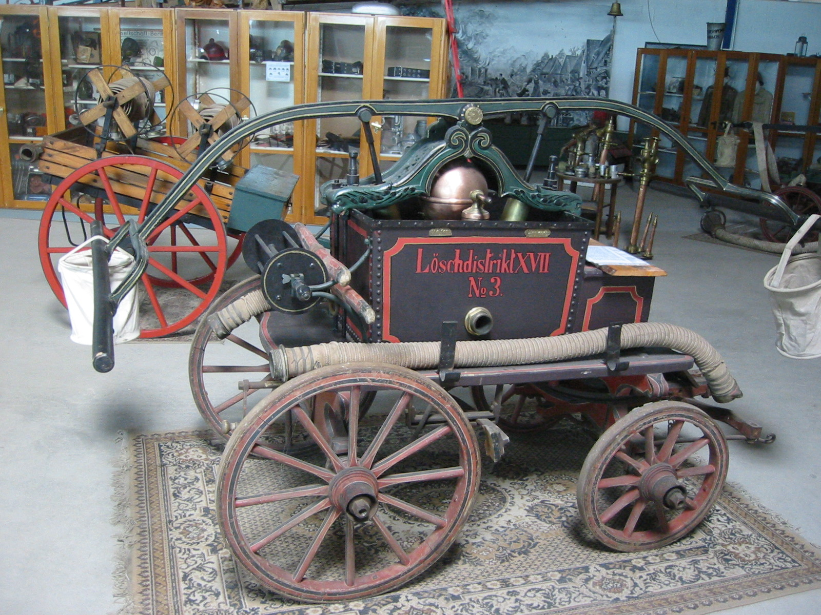 Standort: Rheinland-Pfälzisches Feuerwehrmuseum Hermeskeil, Löschkutsche der Feuerwehr Berzweiler